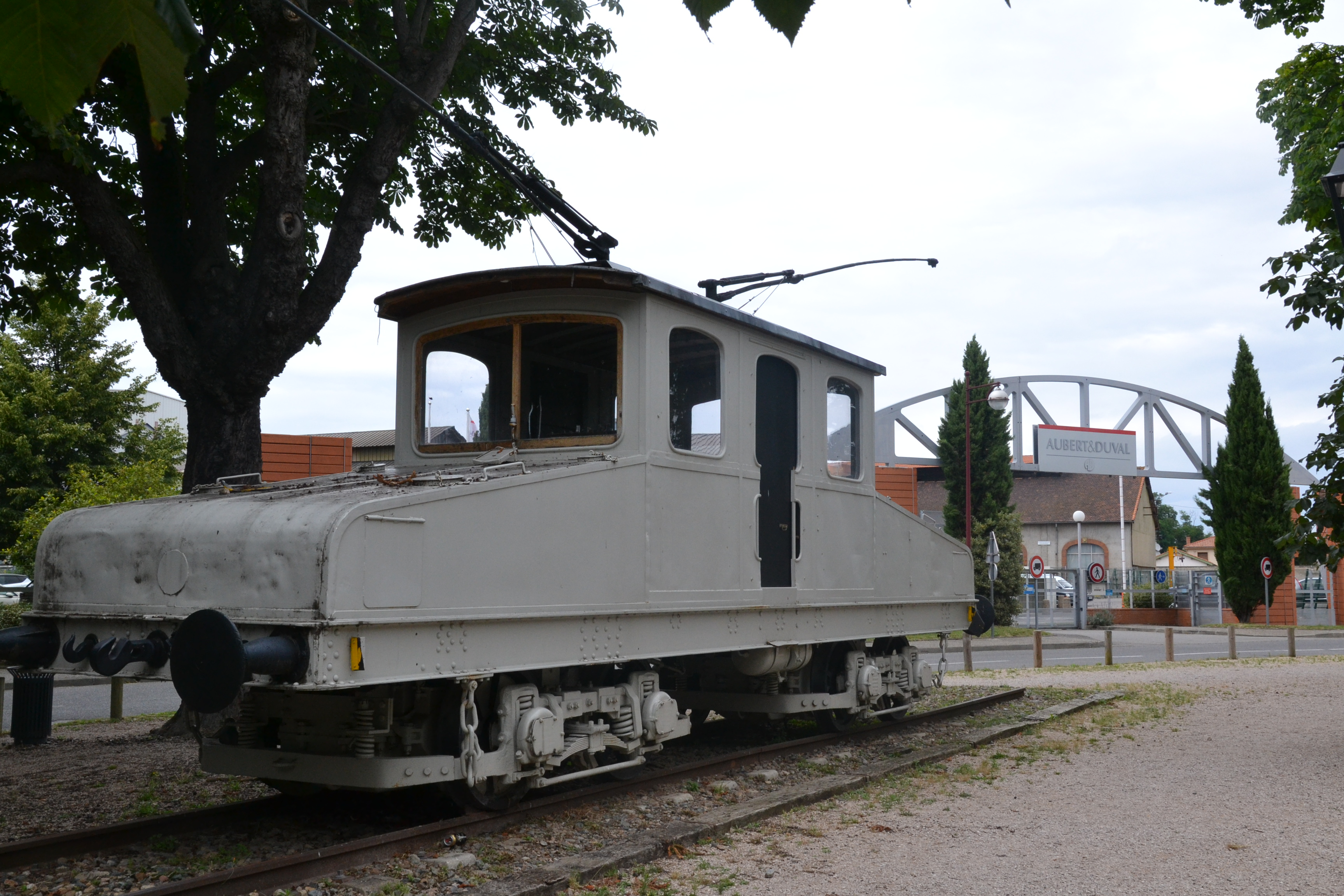 Locomotive BB N°2, autrefois utilisée par l'usine métallurgique de Pamiers (Société métallurgique de l'Ariège) pour transporter les matières premières et les pièces réalisées (Ariège, France). Derrière, l'entrée de l'usine de Pamiers (aujourd'hui nommée Aubert & Duval).